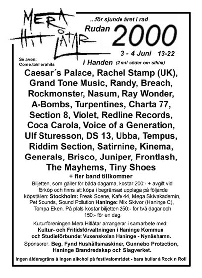 Mera Hitlåtar Poster 2000